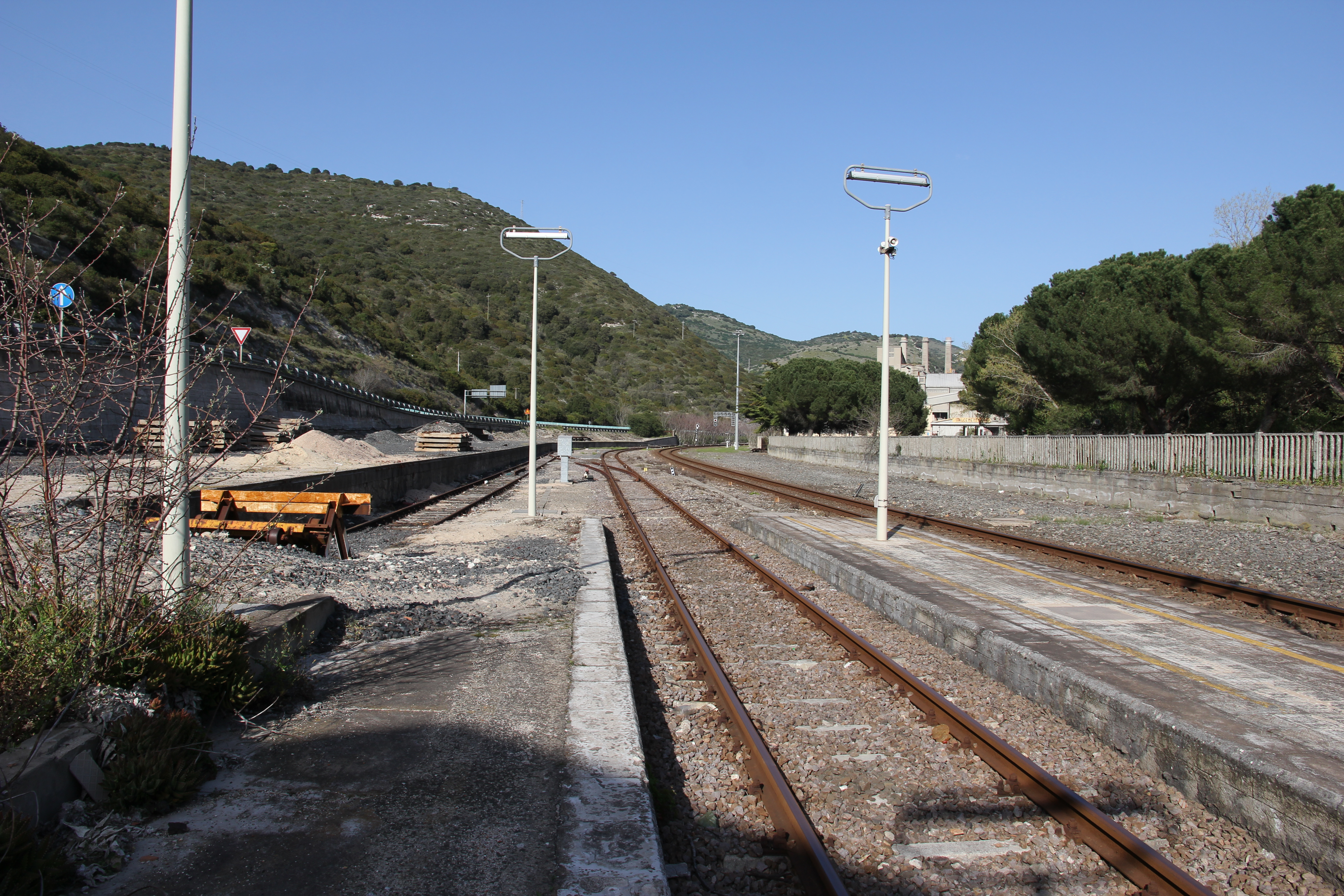 Muros - Stazione ferroviaria di Scala di Giocca